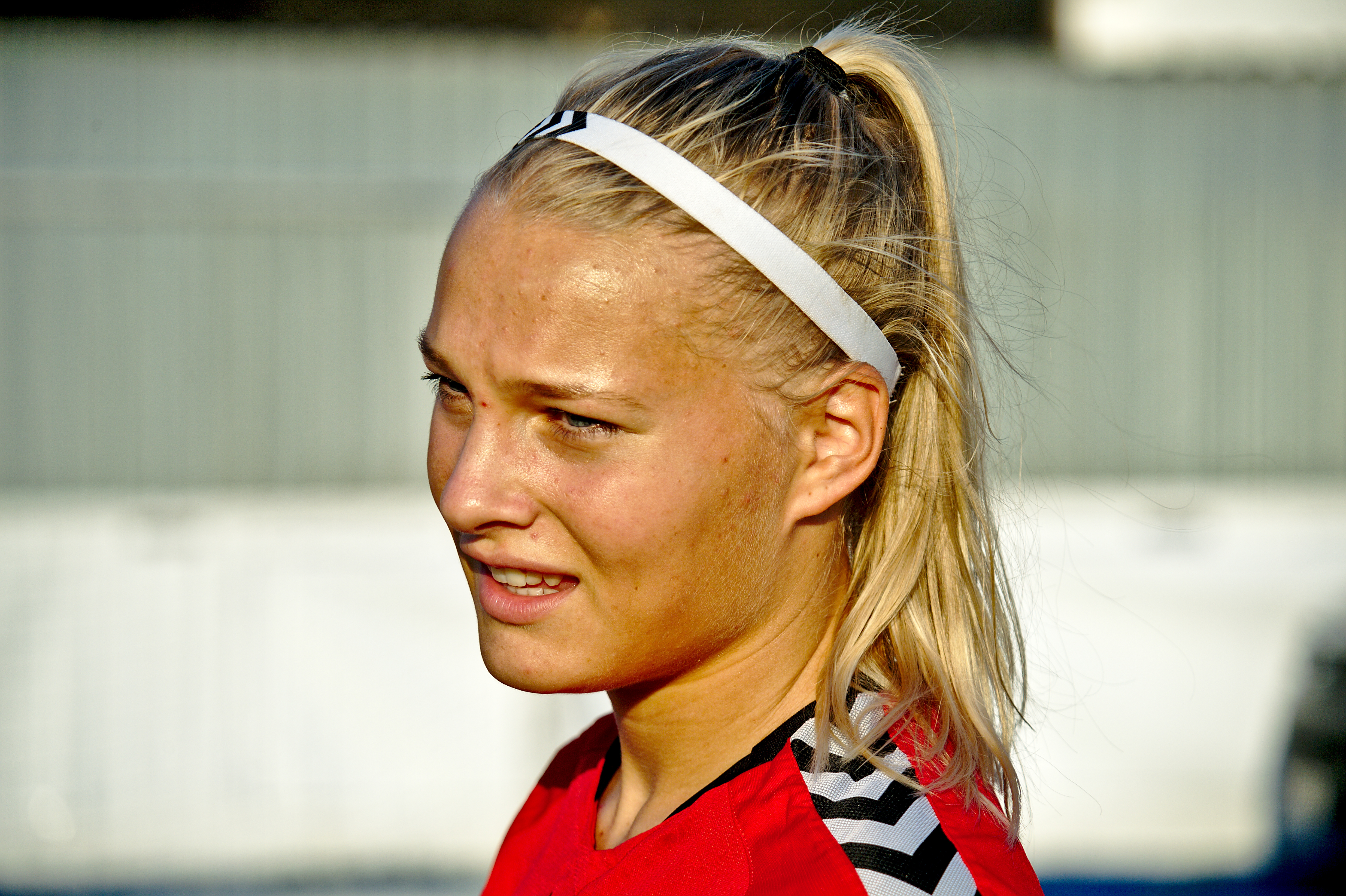 Freundschaftsspiel ÖFB Damen Nationalmannschaft gegen Dänemark am 6. Juli 2017. Bild zeigt: Stine Larsen